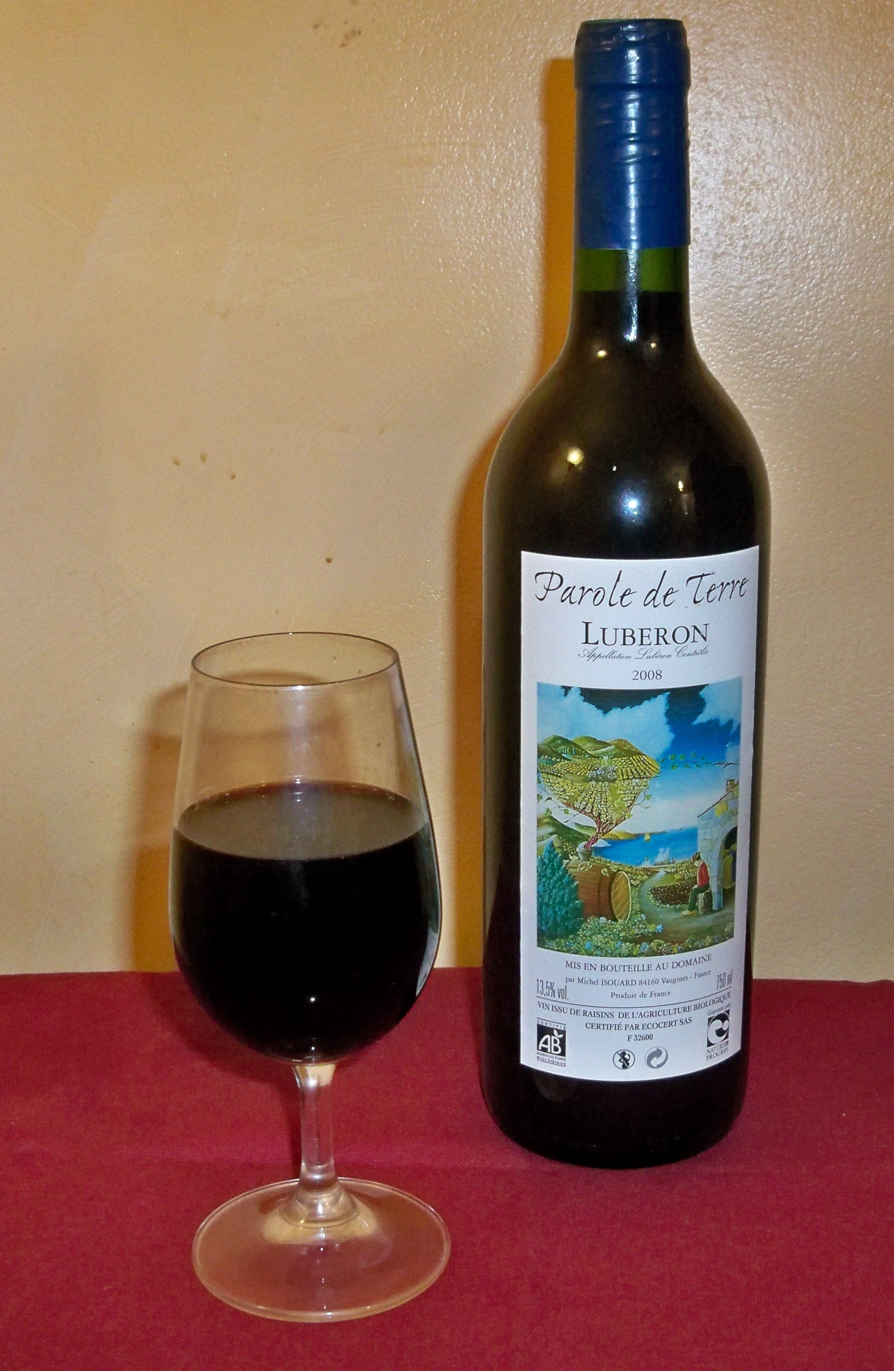 Bouteille du Luberon, Vaucluse, France